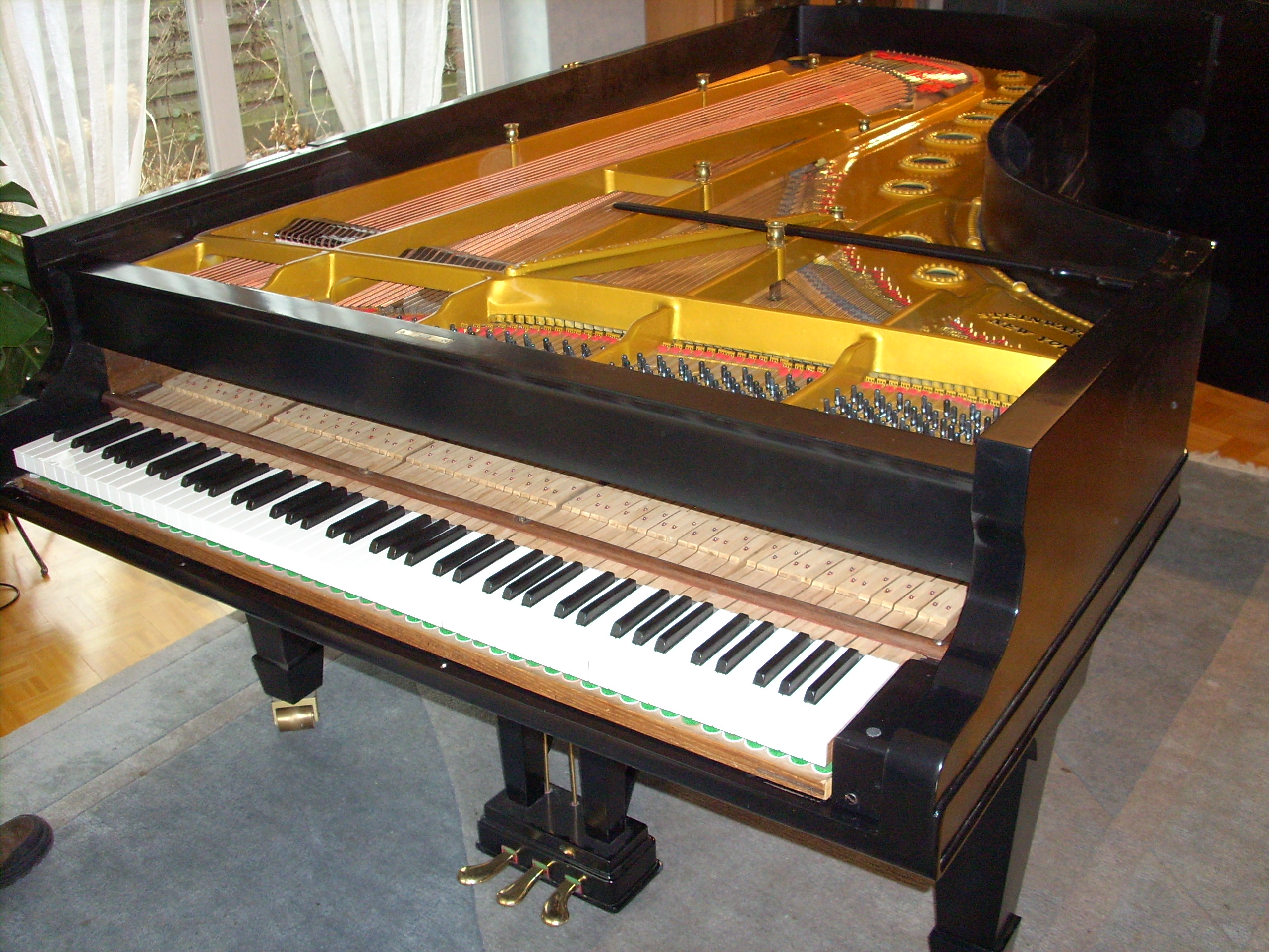 Konzertflügel Steinway & Sons "Centennial D-270" vom September 1877 während Wartungsarbeiten